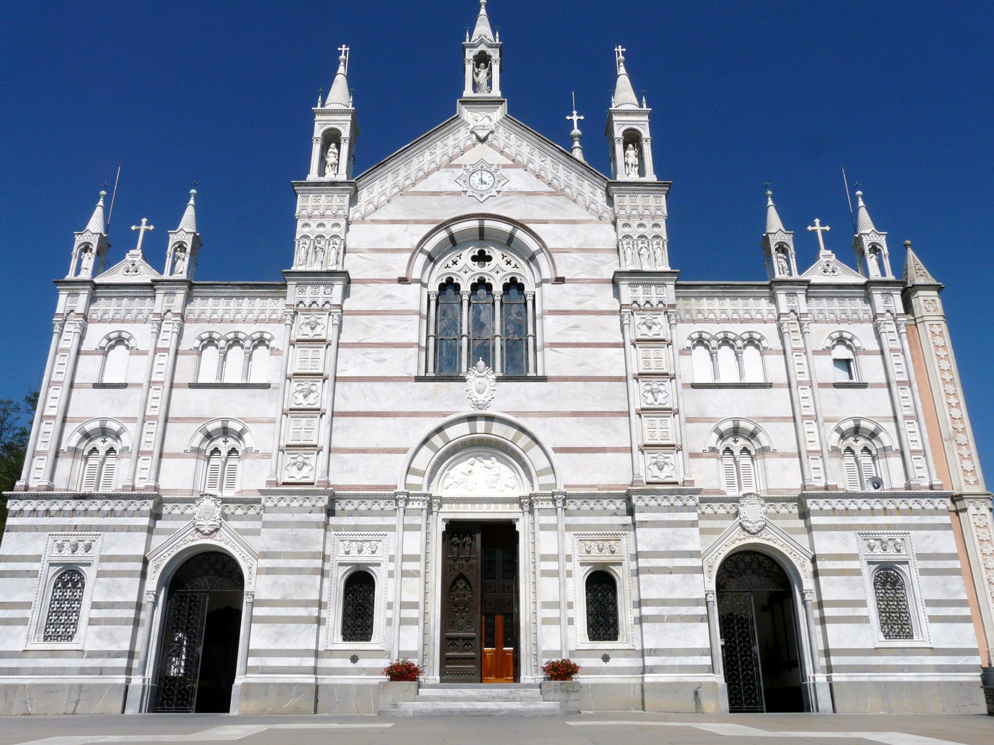 Serie di immagini esterne del santuario di Nostra Signora di Montallegro, Rapallo, Liguria, Italia